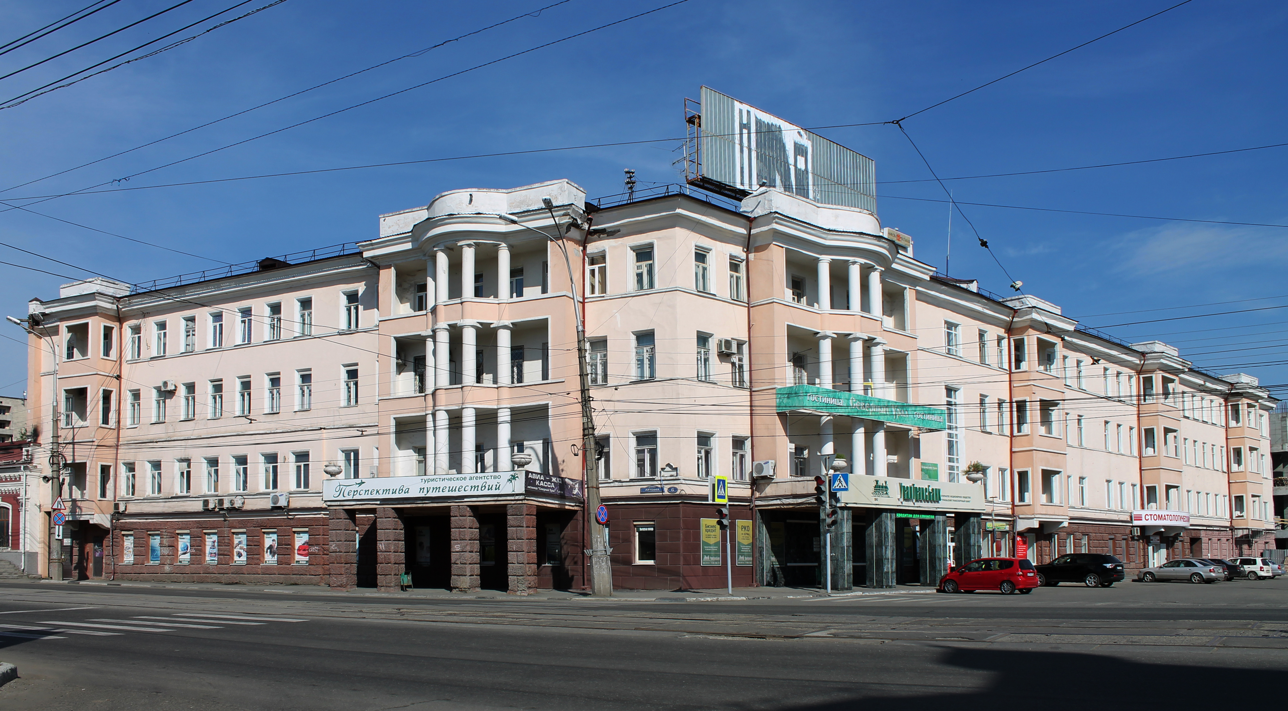 Нижний Тагил, проспект Ленина, 6